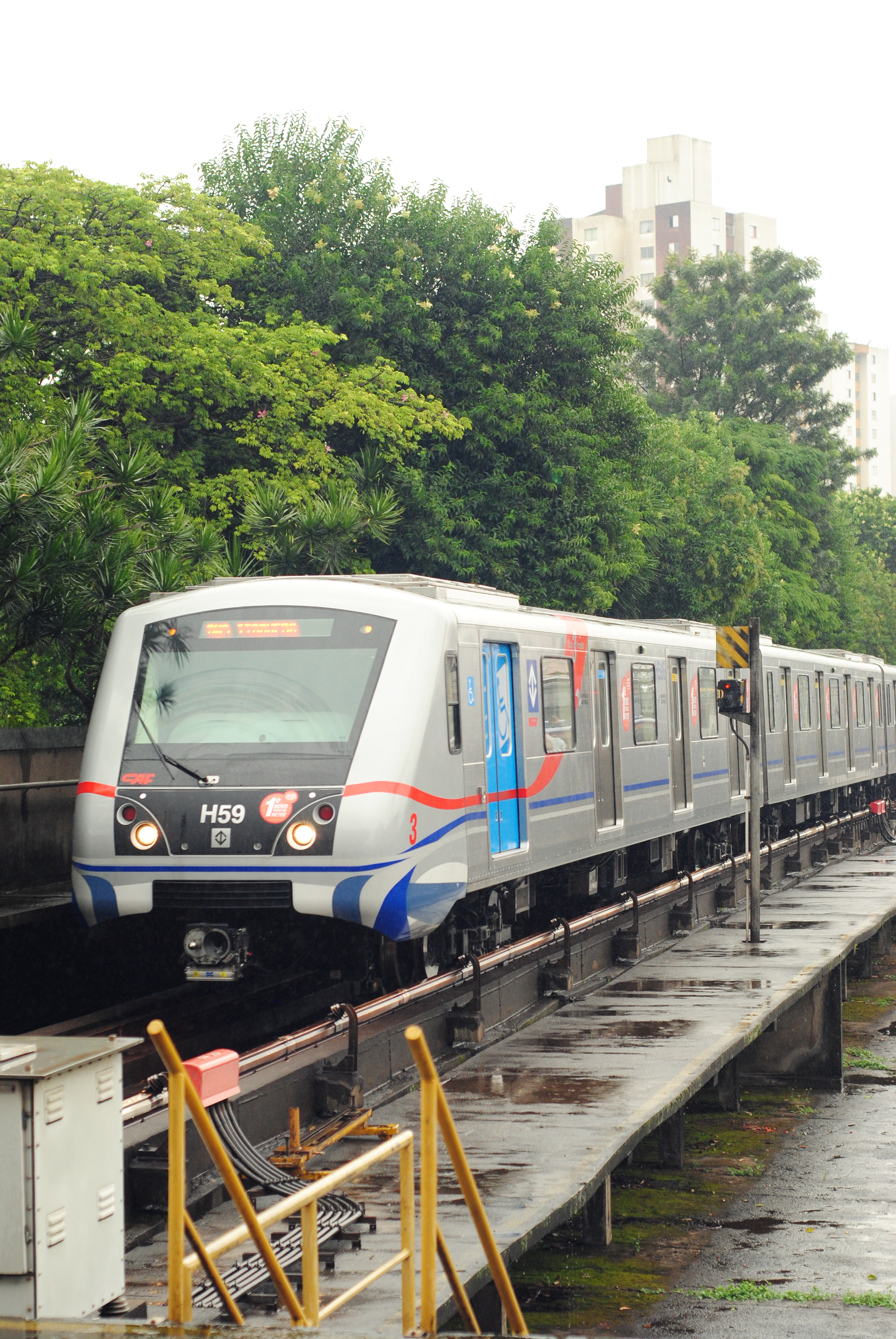 Composição número 359 (H-59) realizando alinhamento na estação Bresser-Mooca pela via 2 (BRE-2).